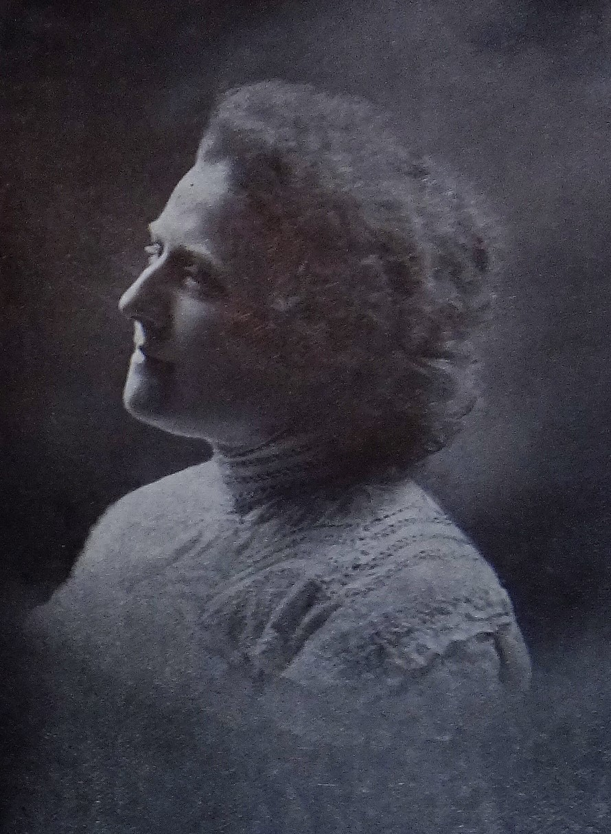 Zdenka Wiedermannová-Motyčková